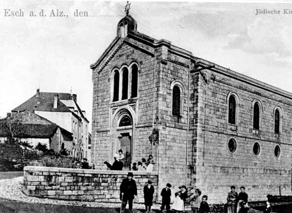 Déi fréier Synagog vun Esch-Uelzecht, 1941 vun den Nazien zerstéiert.